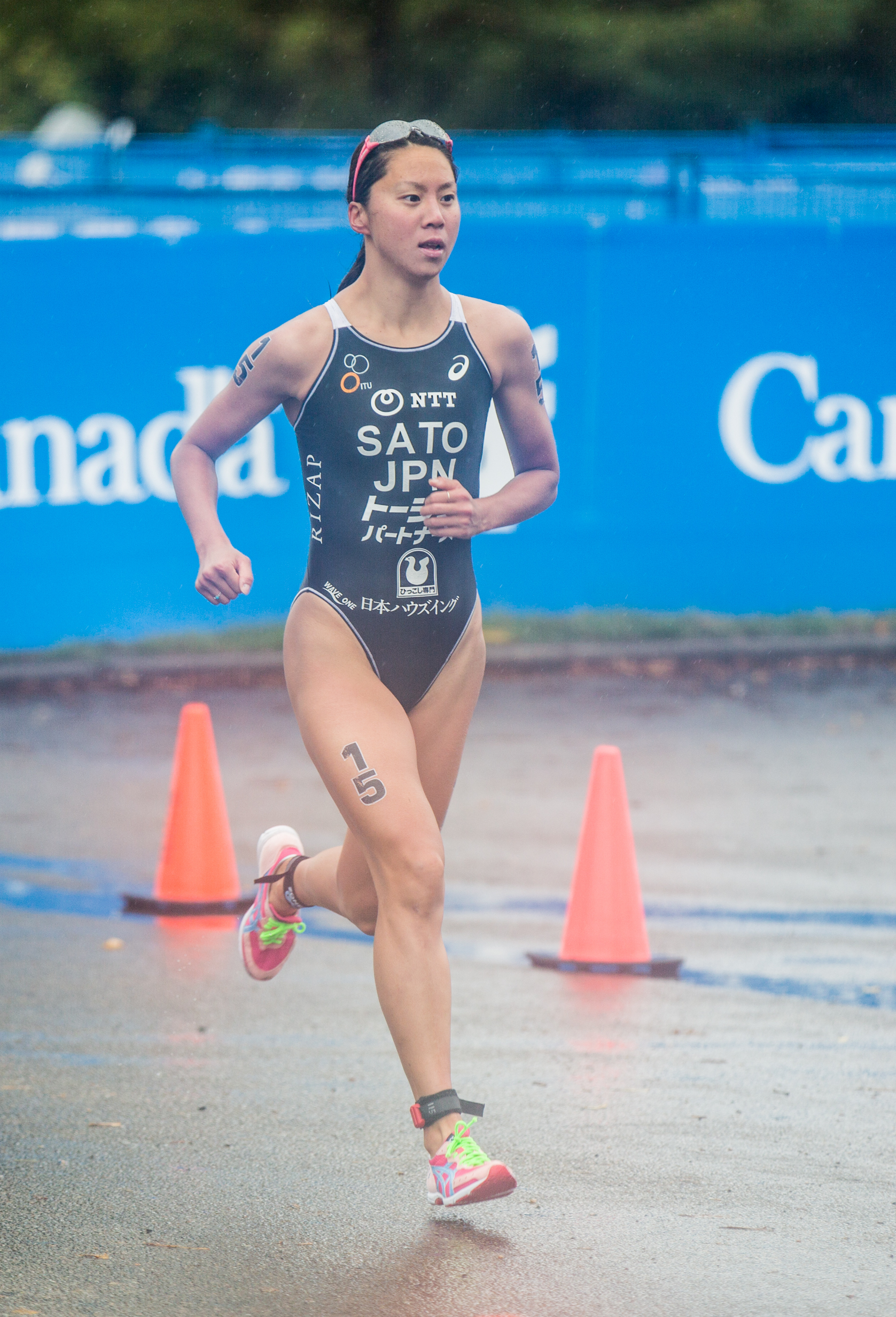 Sanders Sato sur les WTS 2015 Edmonton